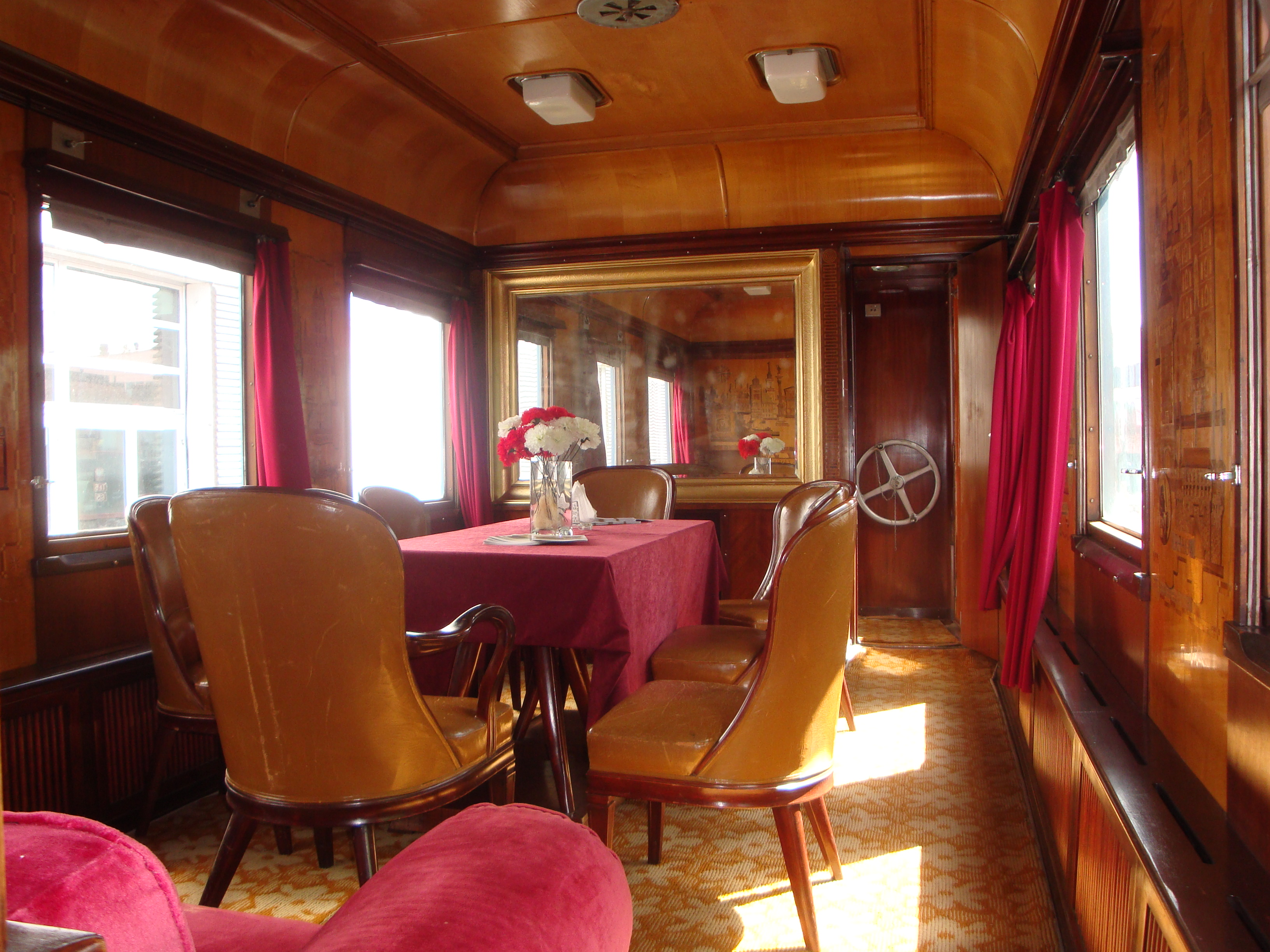 Salon wagonu Ashx01 "Salonka Bieruta".